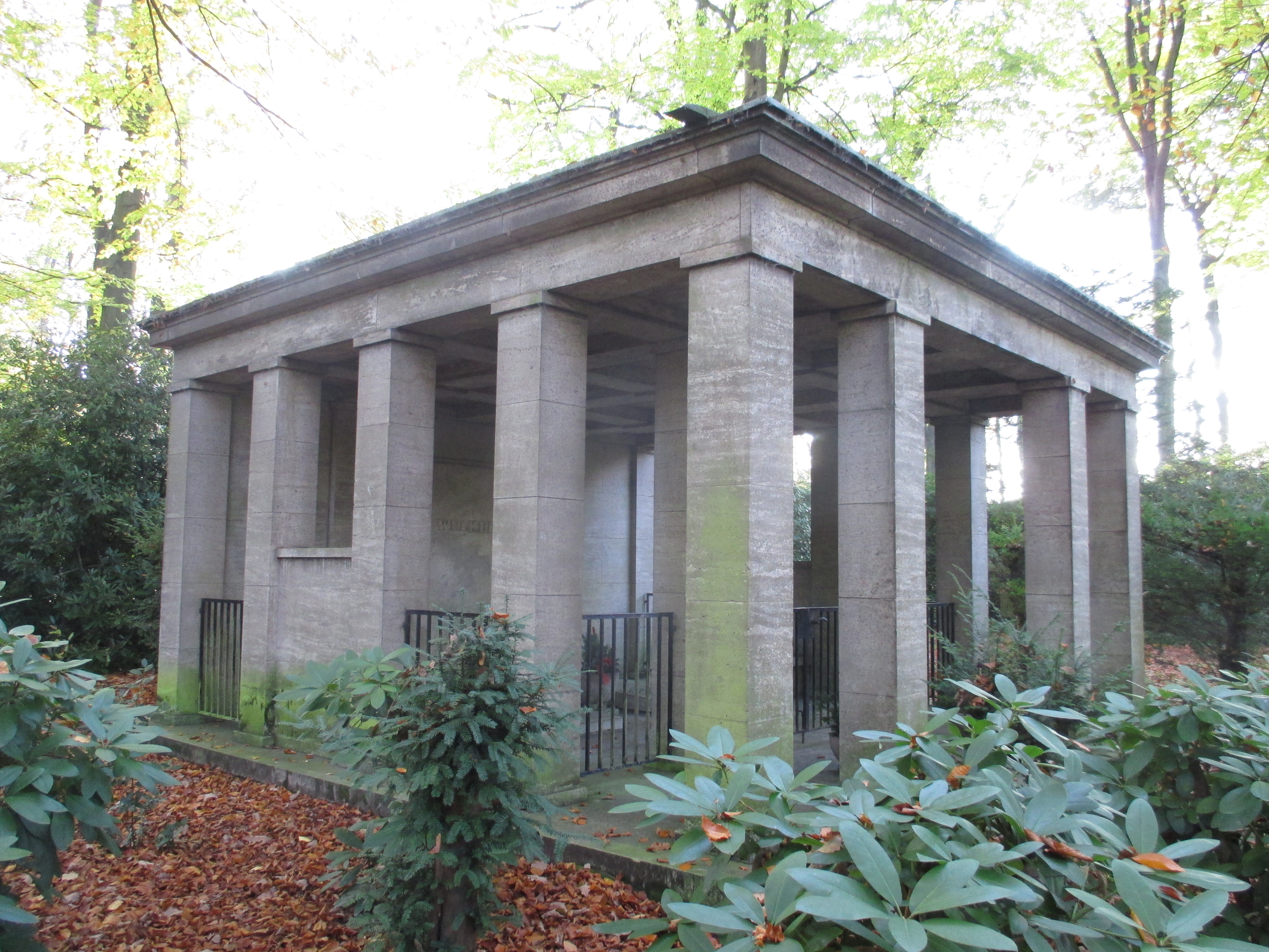 Mausoleum des Generaldirektors Johann Wilhelm Welker.